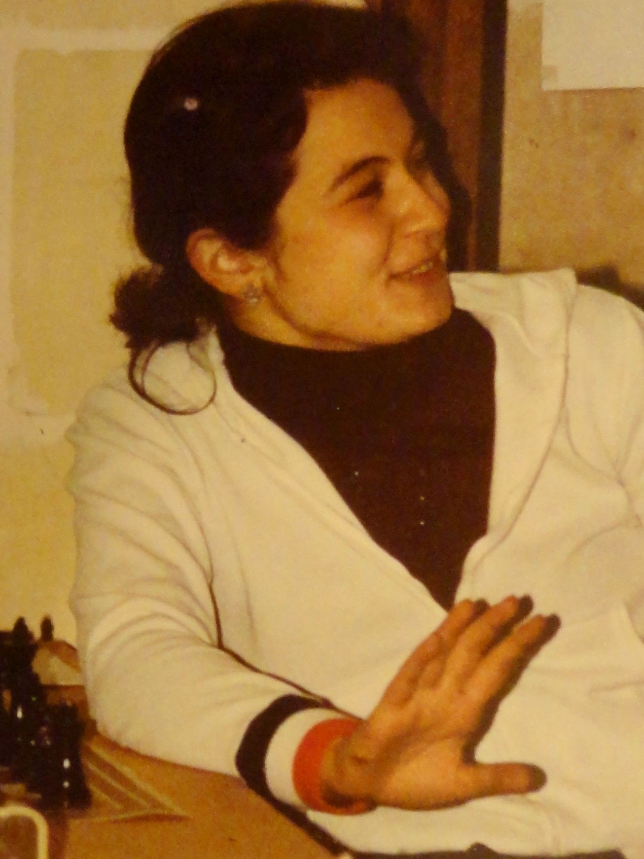 Nana Ioseliani, Schacholympiade 1980 in Valletta auf Malta.